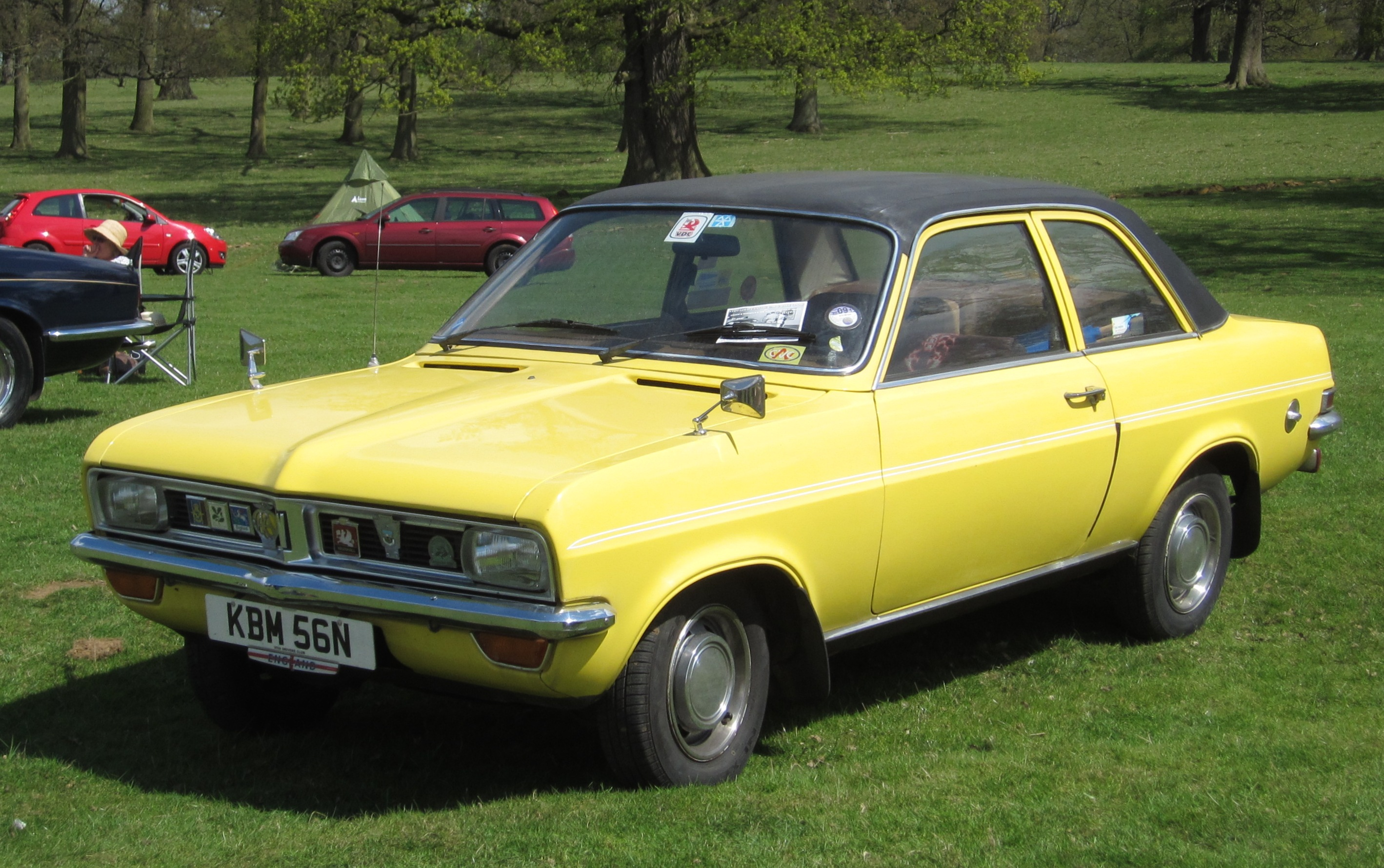 Vauxhall Viva HC (1975)